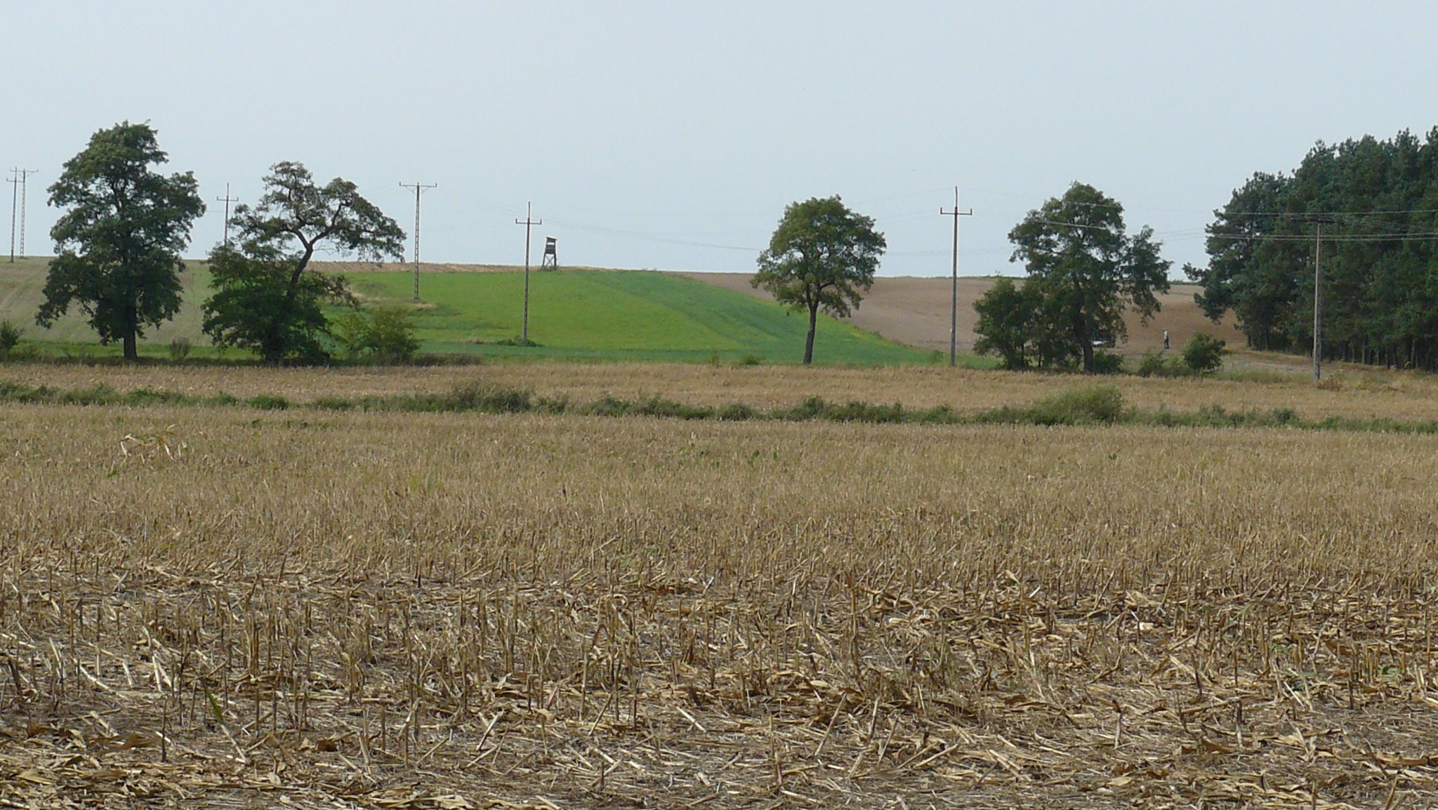 Stare Tarnowo i okolice.